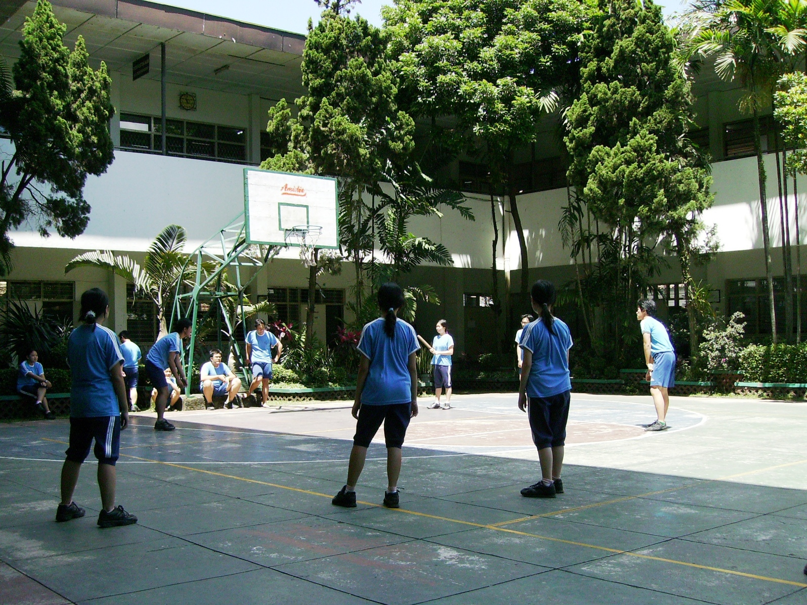 Siswi - Siswa SMA Trinitas bermain kasti saat pelajaran olahraga